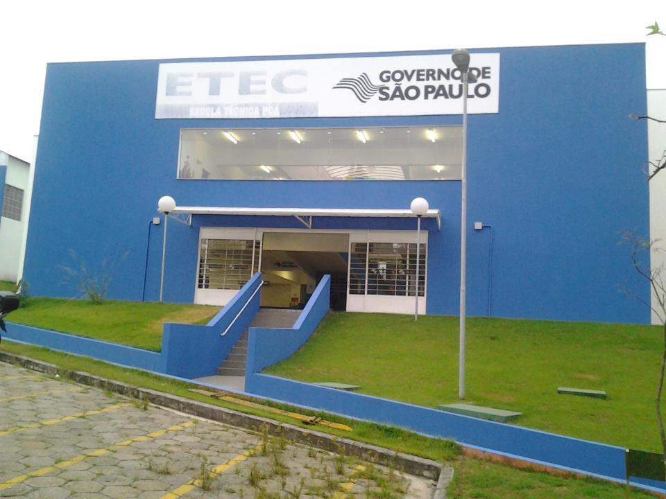 Fachada da ETEC de Poá